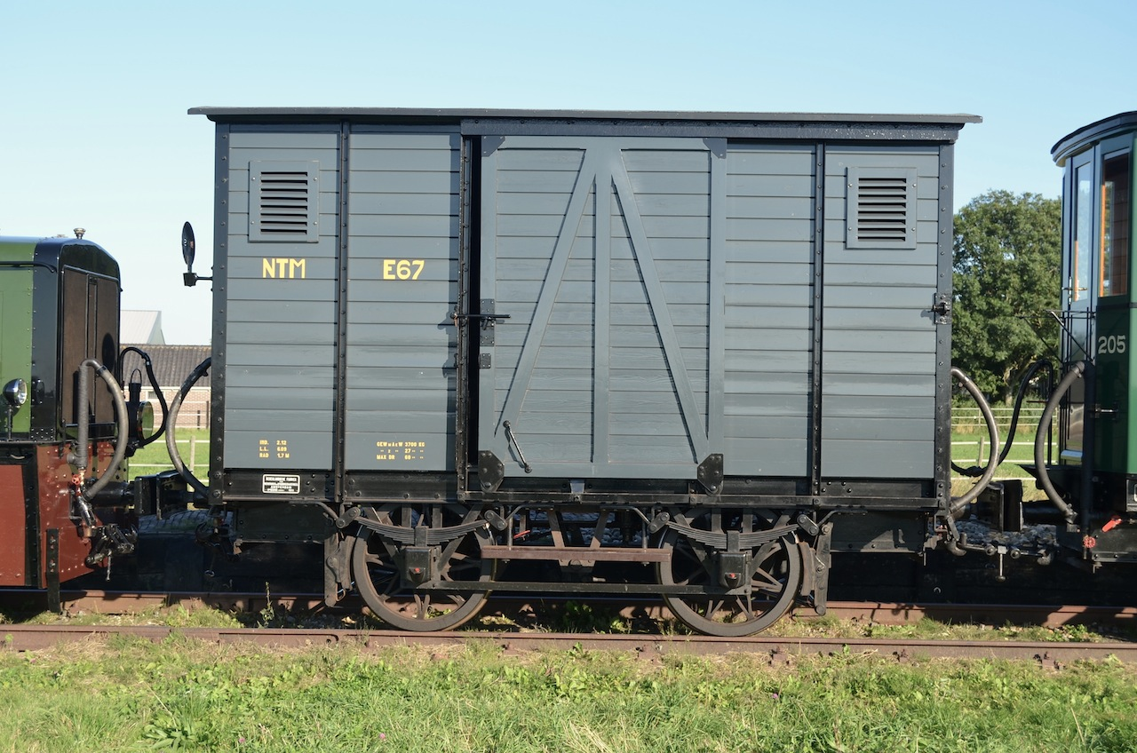 SHM goederenwagen E67 van de Nederlandse Tramweg Maatschappij, te Twisk; 29 september 2013. Foto: Erik Swierstra.